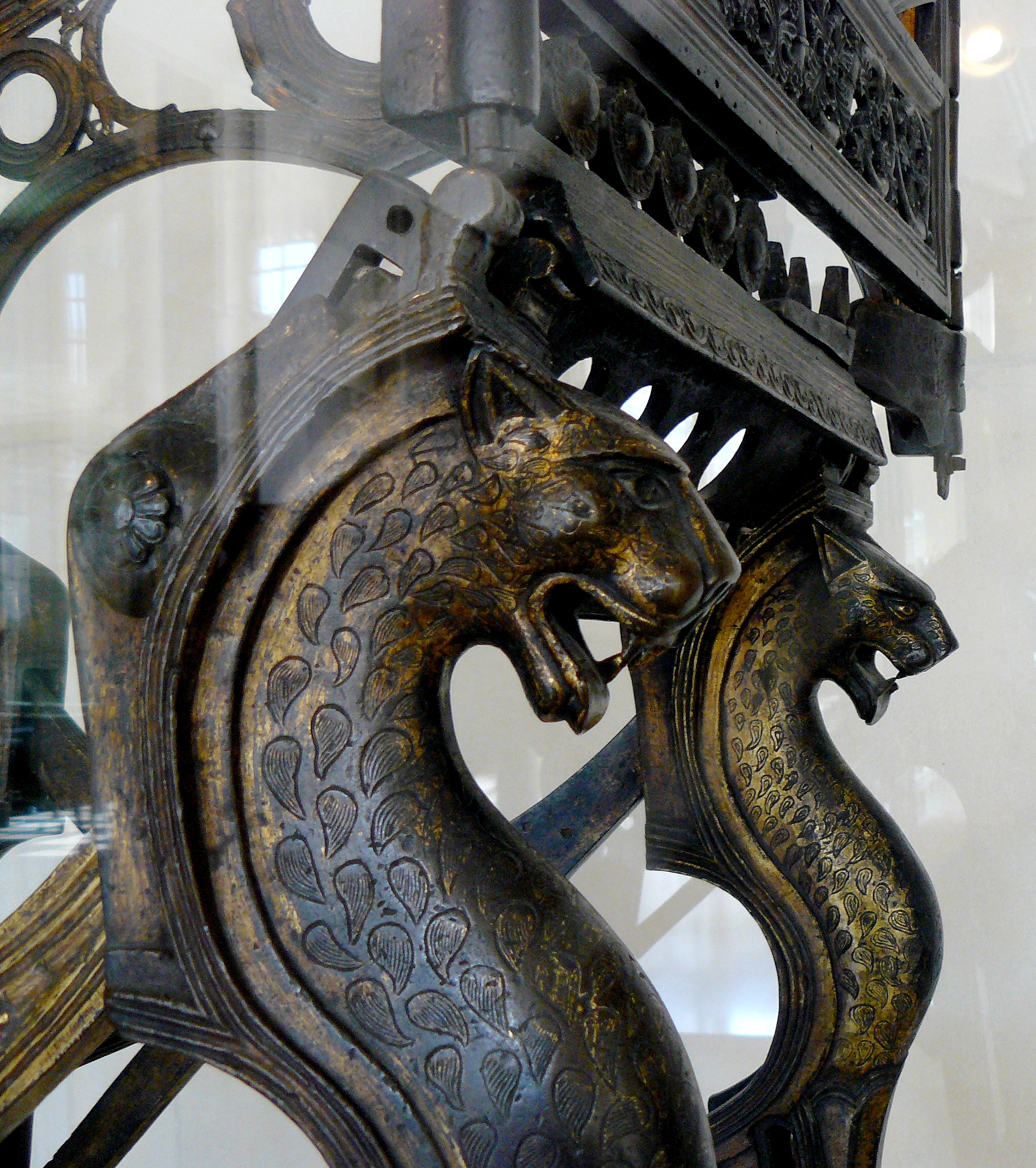 Siège en bronze appelé Trône de Dagobert, époque mérovingienne et carolingienne - Cabinet des médailles de la BNF - Paris - n° Inv : 55-651 - Détail des protomés de panthères décorant les montants.